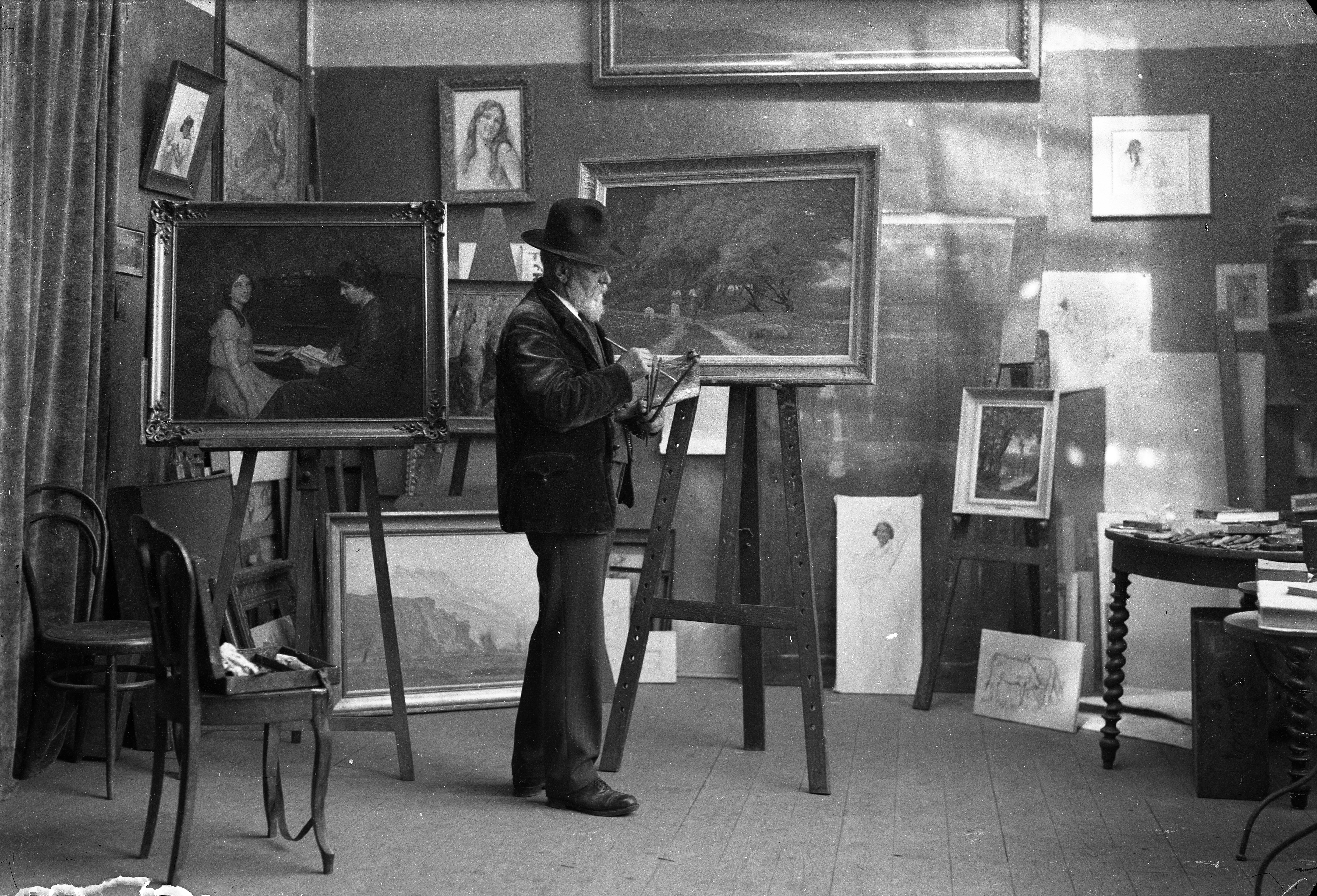 Frédéric Rouge dans son atelier d'Ollon